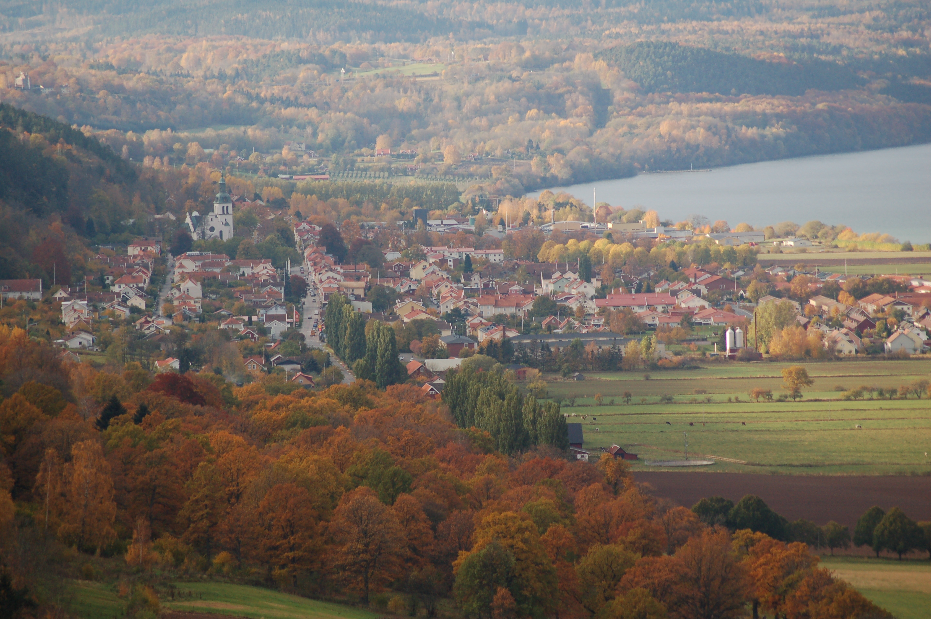 View over Gränna